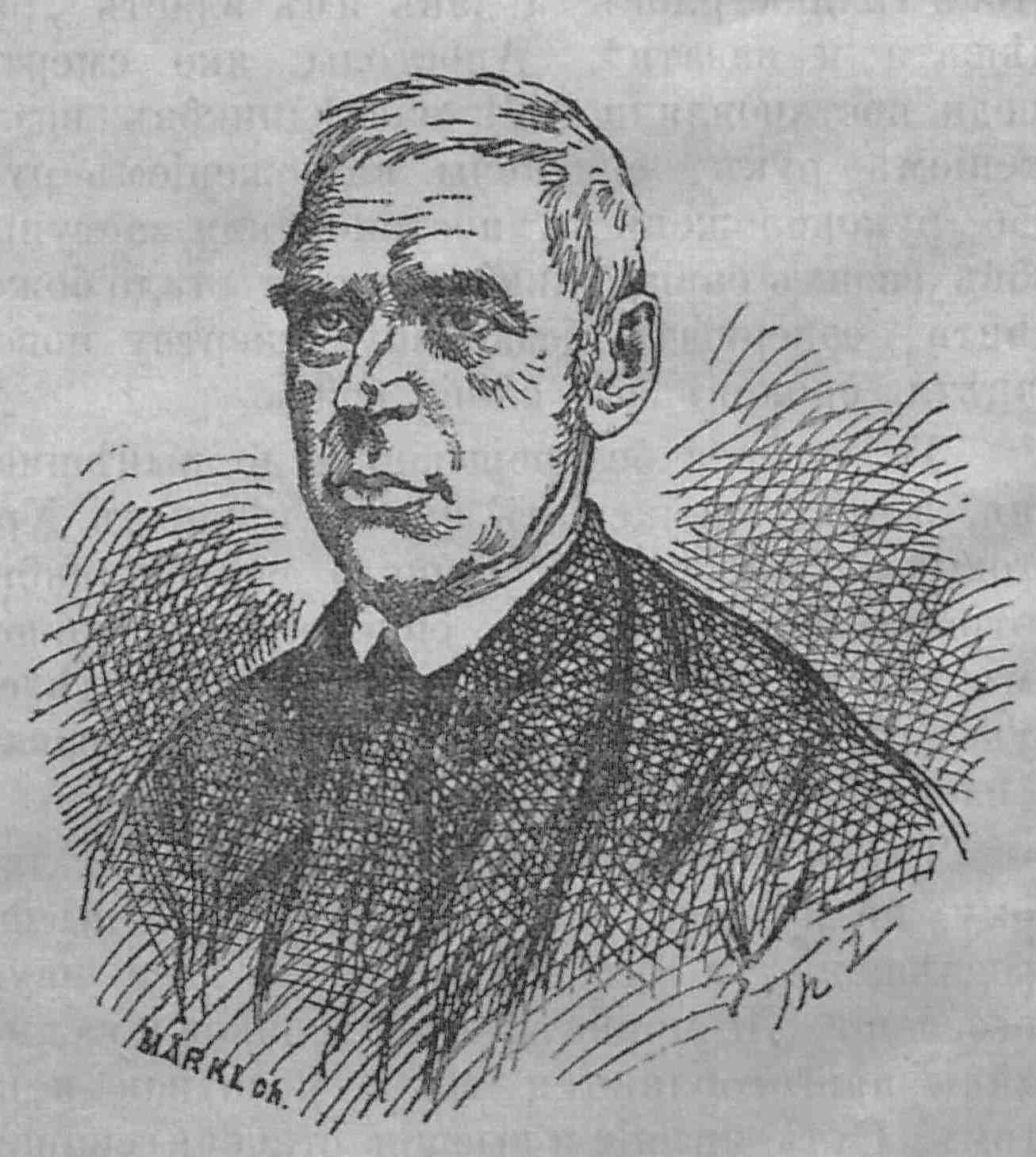 Модест Мацієвський (1802-1885) - український церковний і культурно-громадський діяч, священик-василіянин